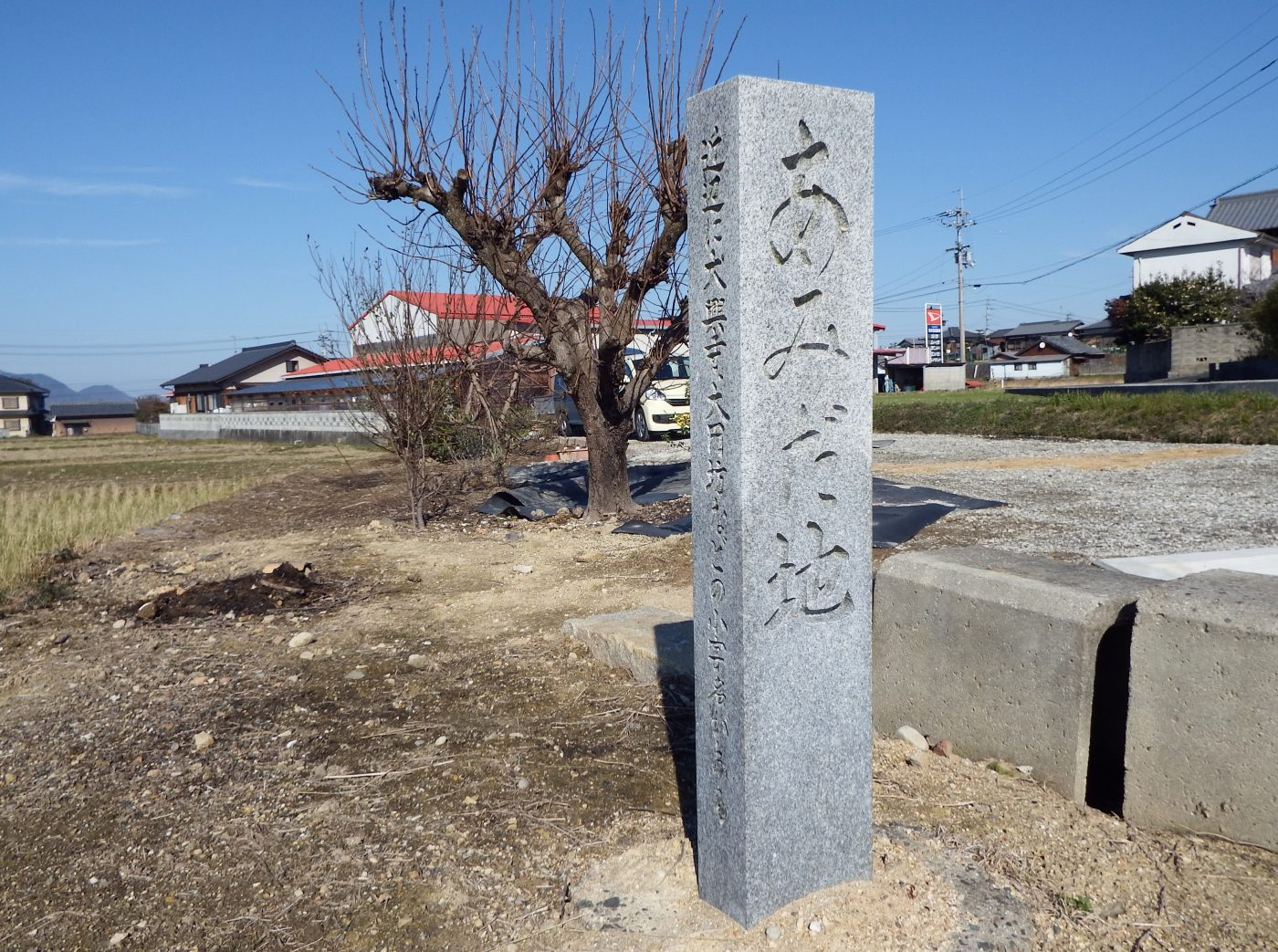 大興寺の草々期の地